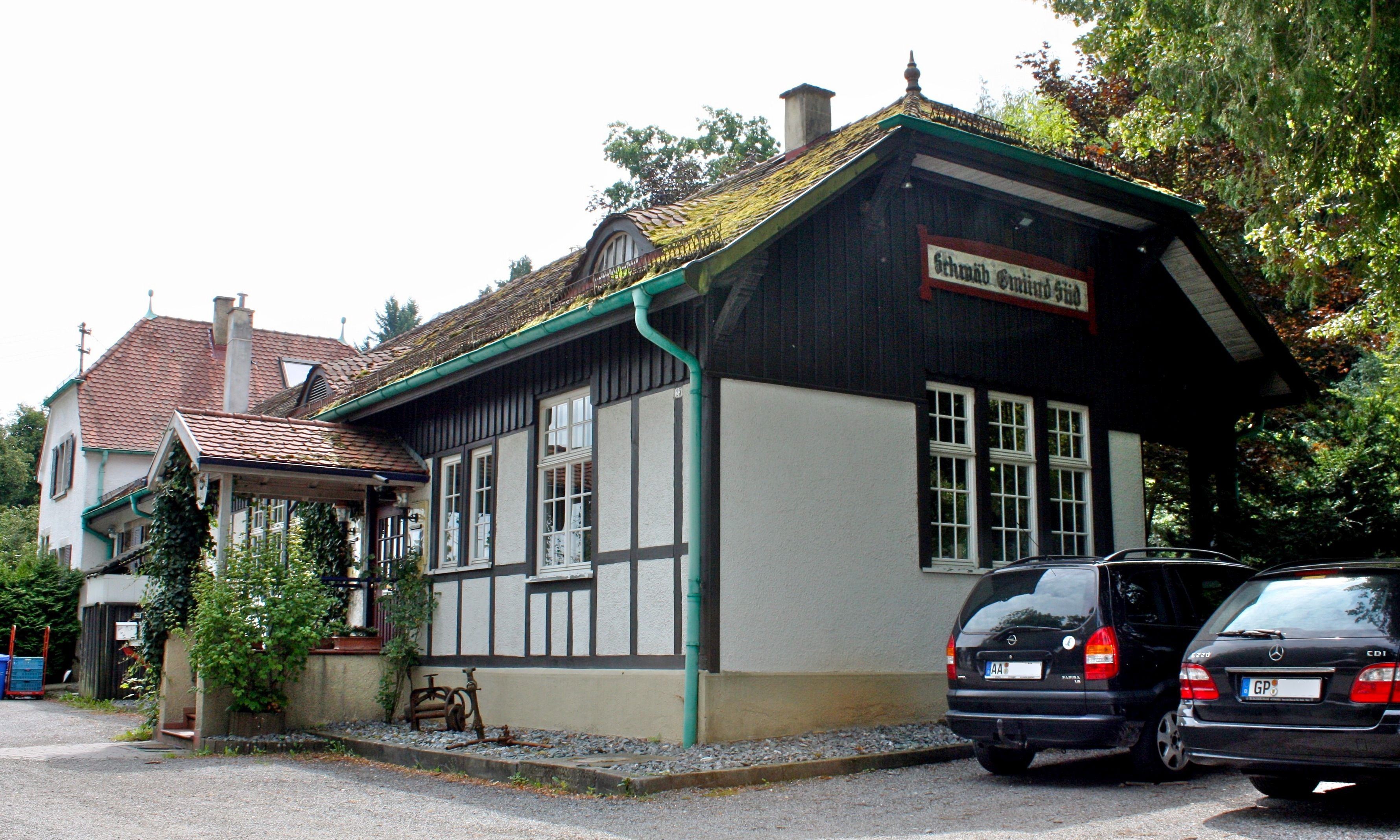 Bahnhof Schwäbisch Gmünd-Süd, an der Hohenstaufenbahn, heute Gaststätte